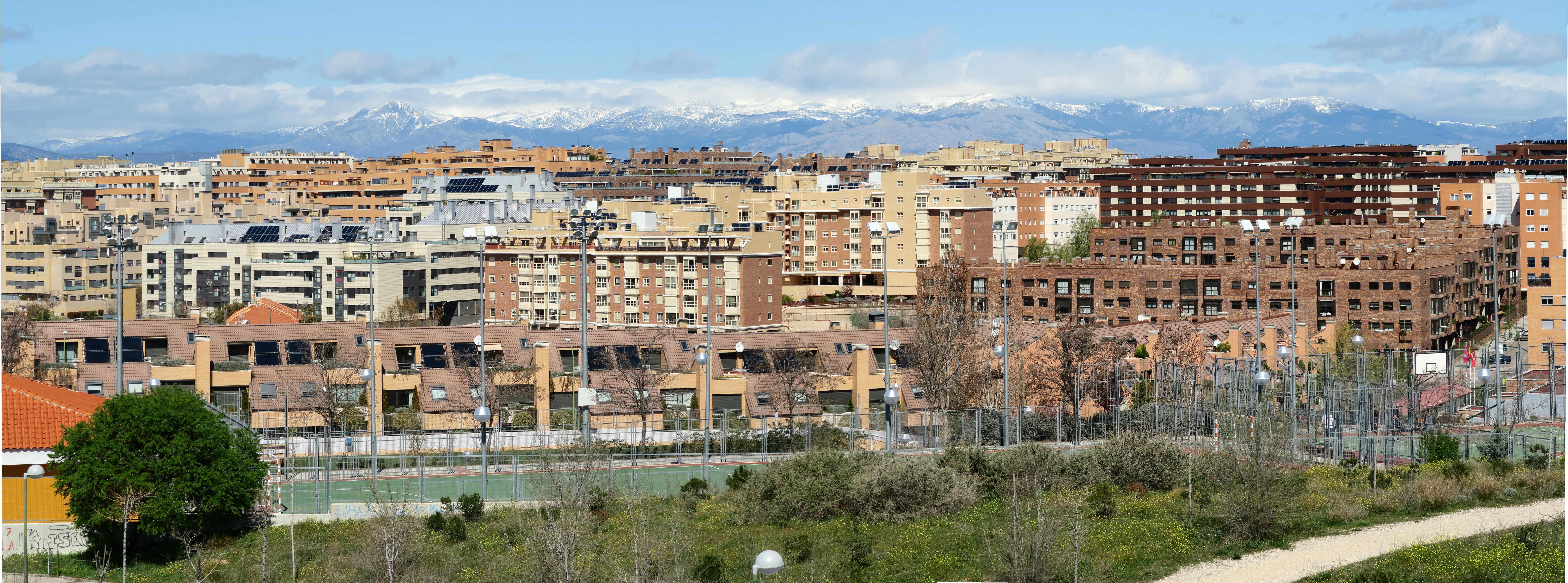 Montecarmelo